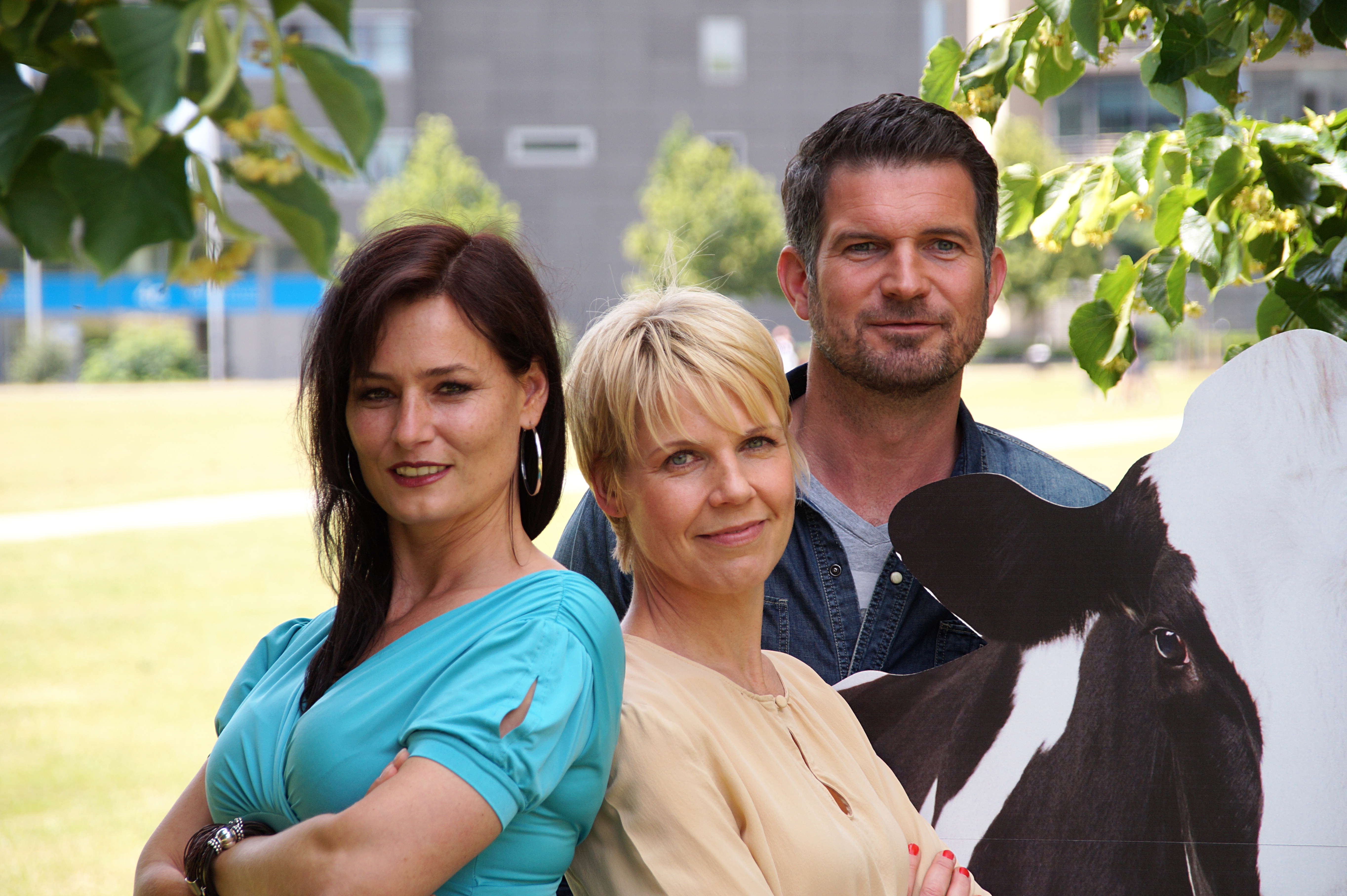 Pressetermin Comedy-Serie „Die Kuhflüsterin" am 25. Juni 2015 im Kölner Filmhaus